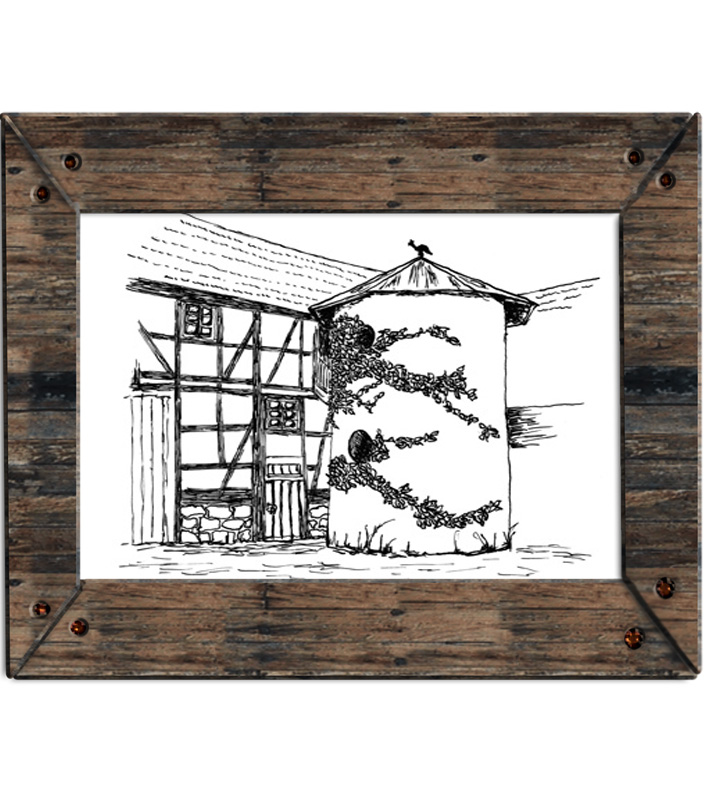 Alte Zeichnung vom Markenzeichen des Museums